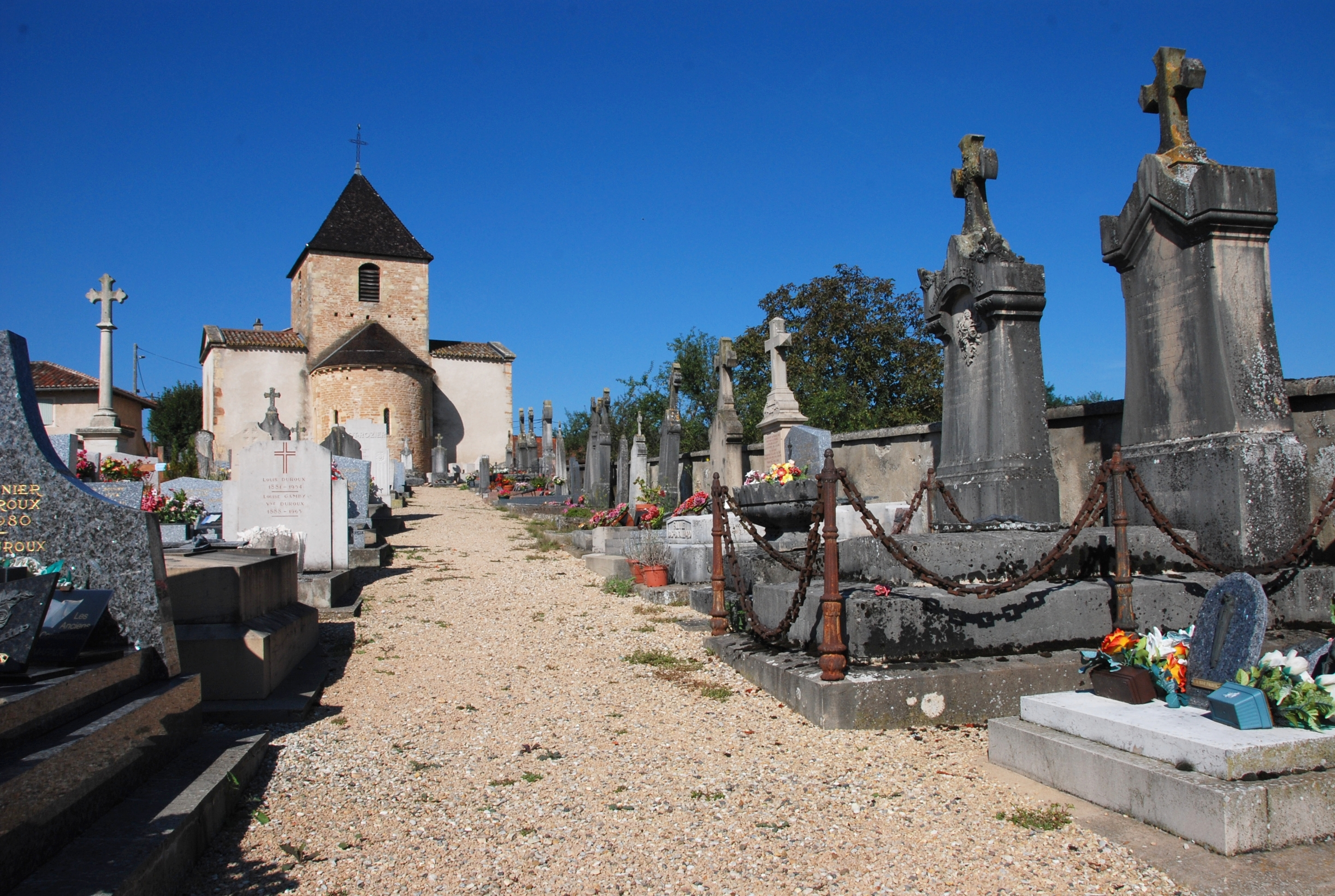 Église Saint-André, (Inscrit, 1947) .